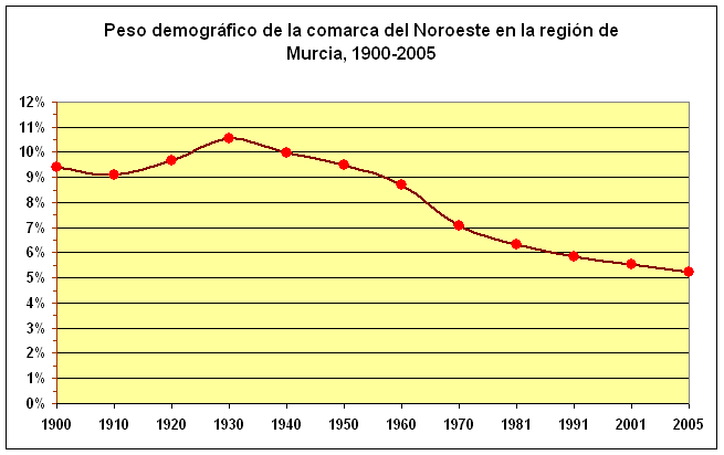 Cuadro 4. Peso relativo de la comarca del Noroeste en el total de la población de la región de Murcia Peso demográfico (porcentaje respecto del total demográfico) de la comarca del Noroeste en el conjunto de la región de Murcia, España. Datos del INE, elaboración propia.